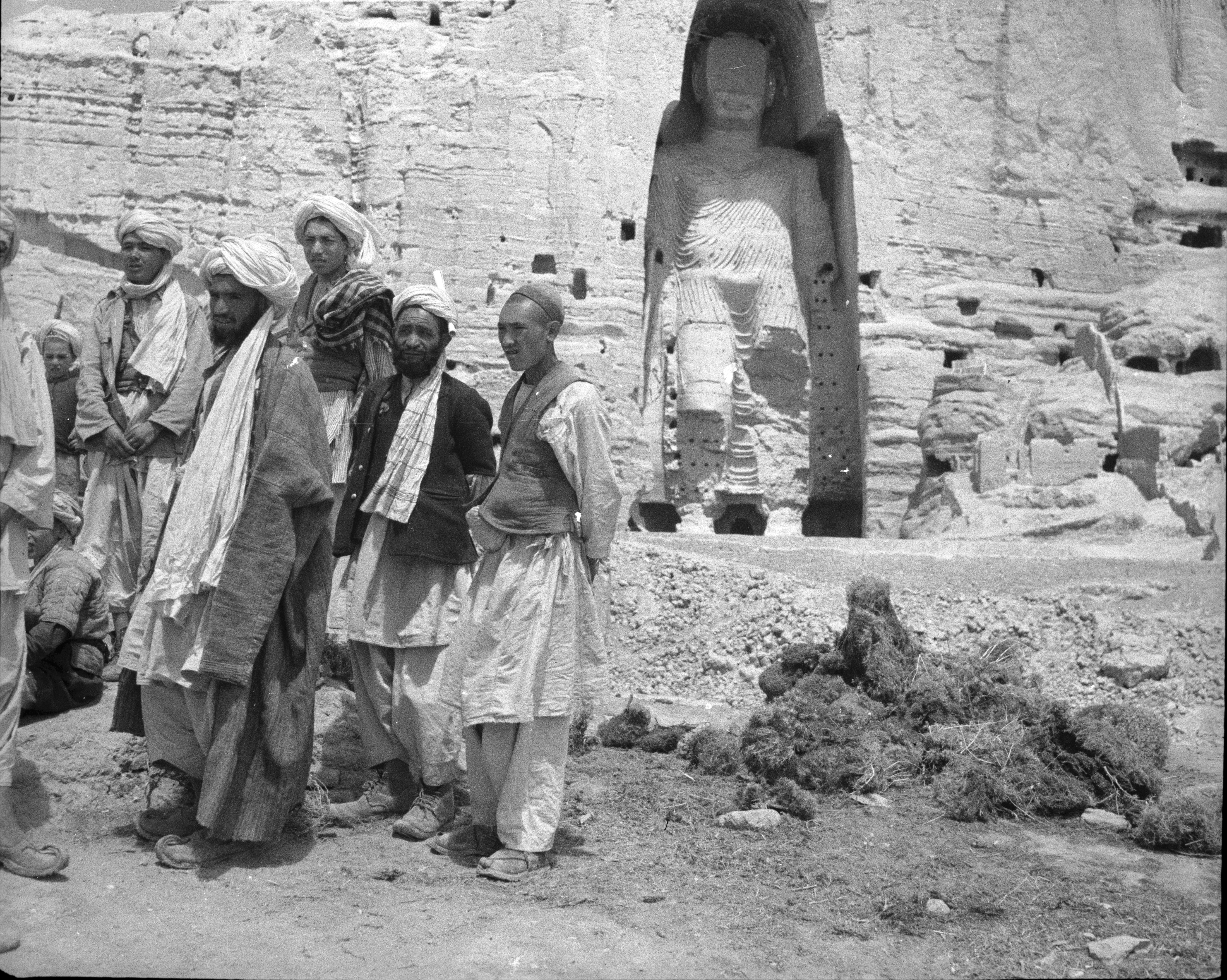 Afghanistan, Bamiyan, Bamyan (Bamian): Menschen; Männer vor dem Grossen Buddha in Bamiyan